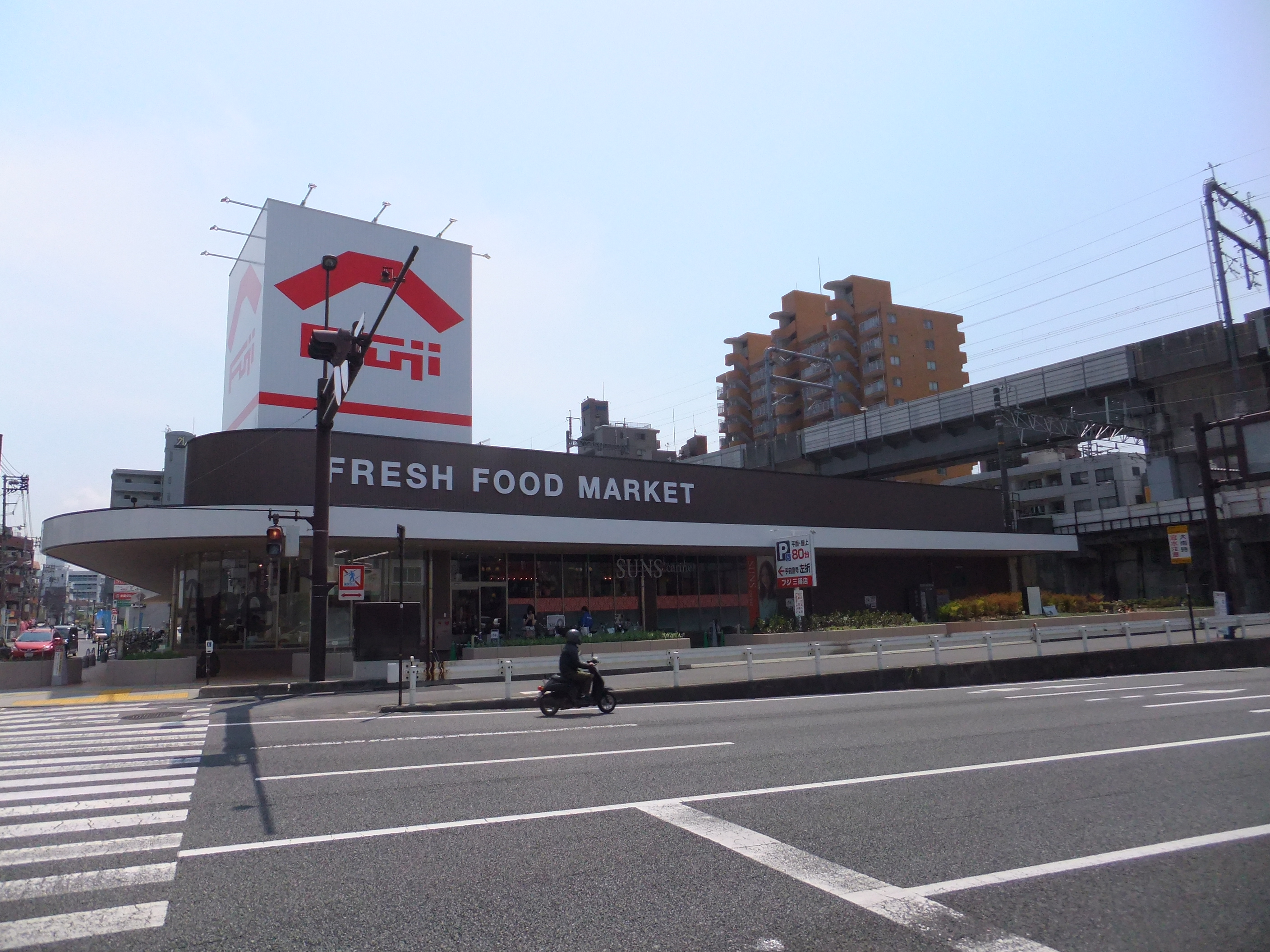 フジ三篠店